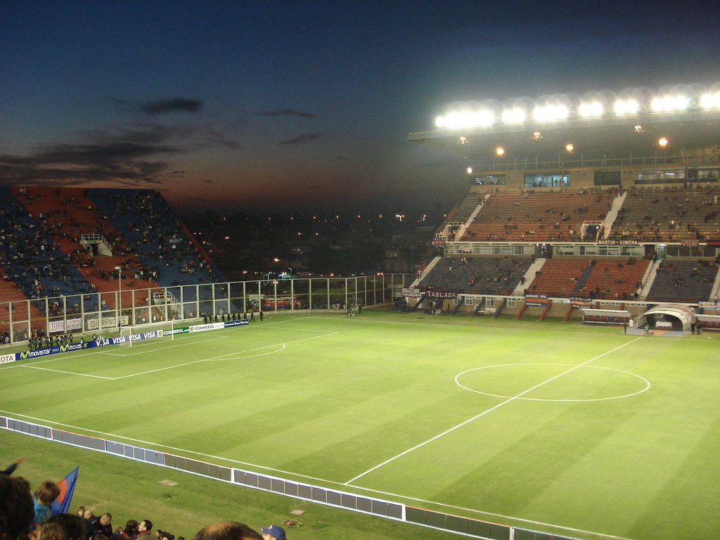 Estadio Pedro Bidegain ("Nuevo Gasómetro"). San Lorenzo 2 - River Plate 1 (2008).